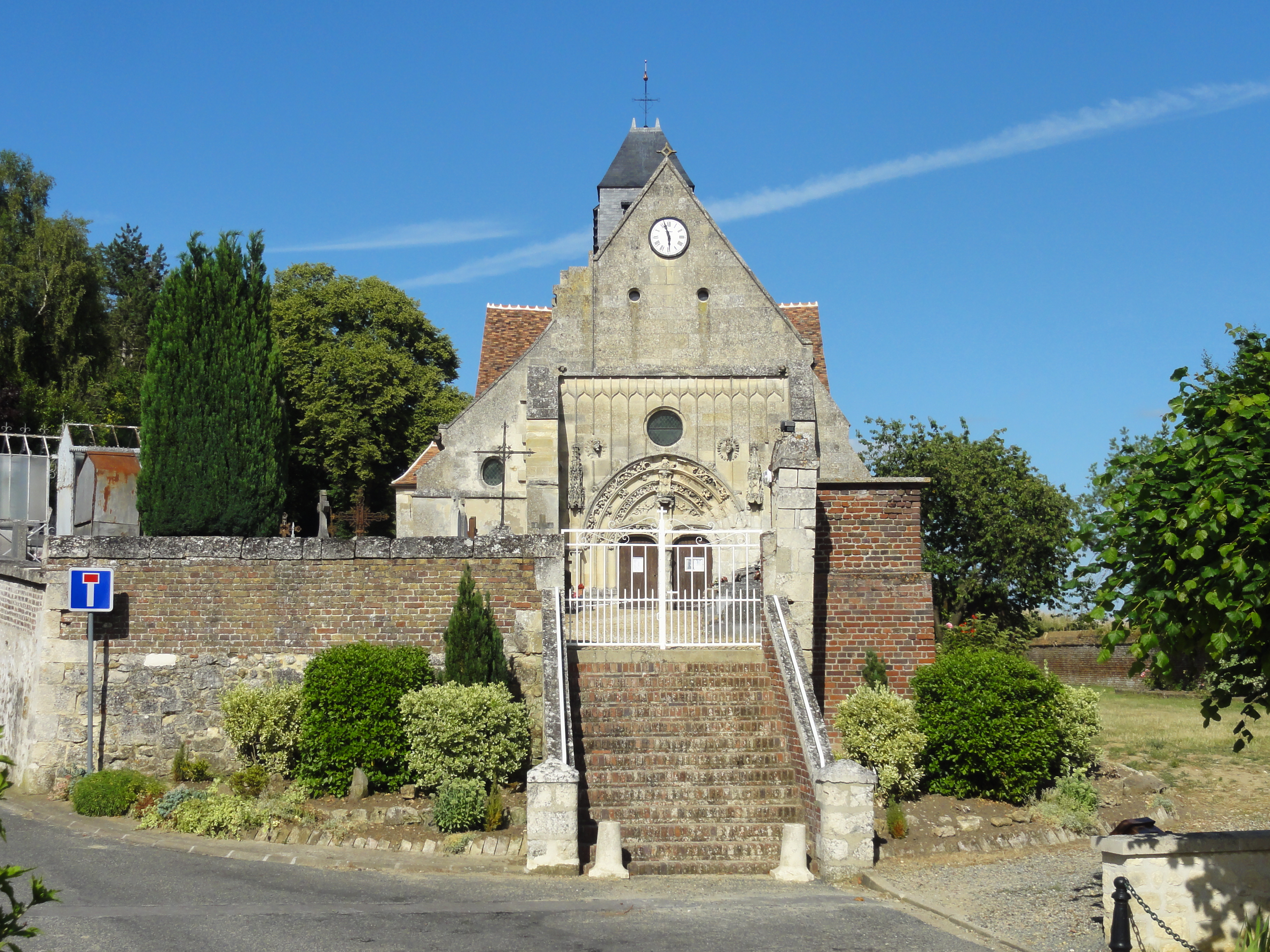 Église Saint-Wandrille de Rivecourt (voir titre).